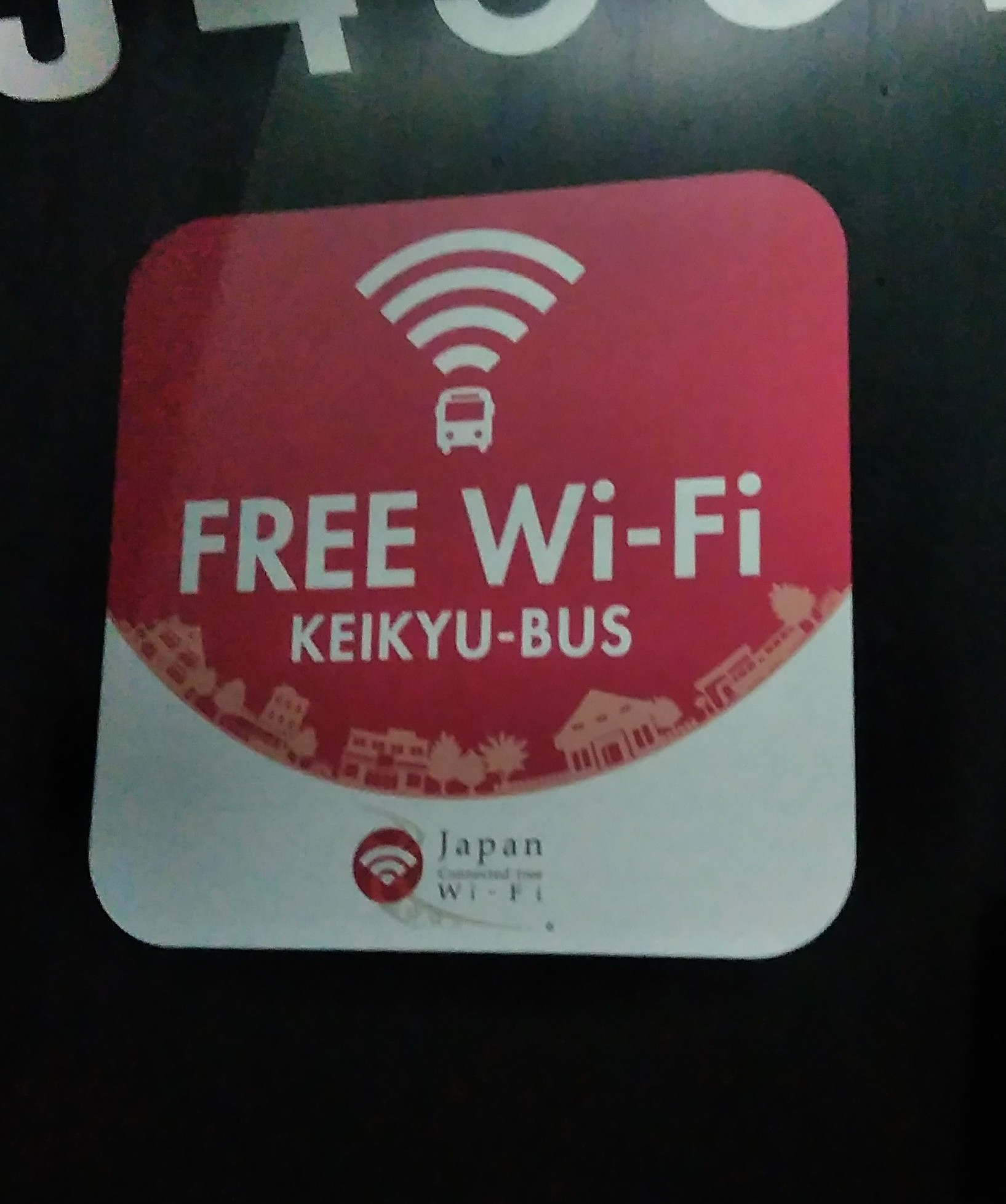 京急の夜行バス・キャメル号の車内Wi-Fi対応表示